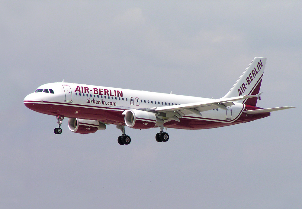 Air Berlin Airbus A320-200 (D-ABDQ) in Düsseldorf (EDDL)